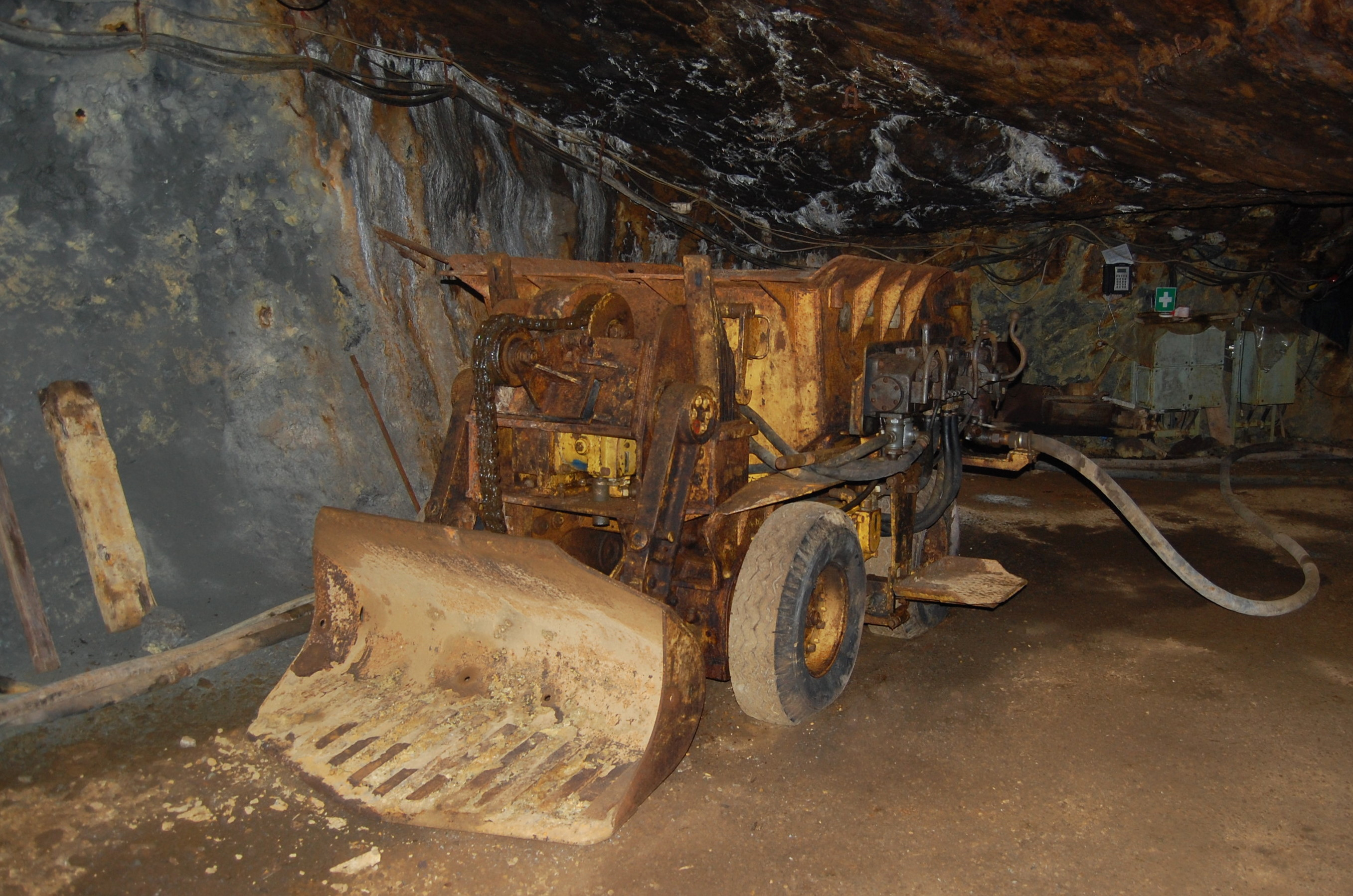 Besucherbergwerk Drei Kronen und Ehrt, Bunkerlader BL500 mit Druckluftantrieb.